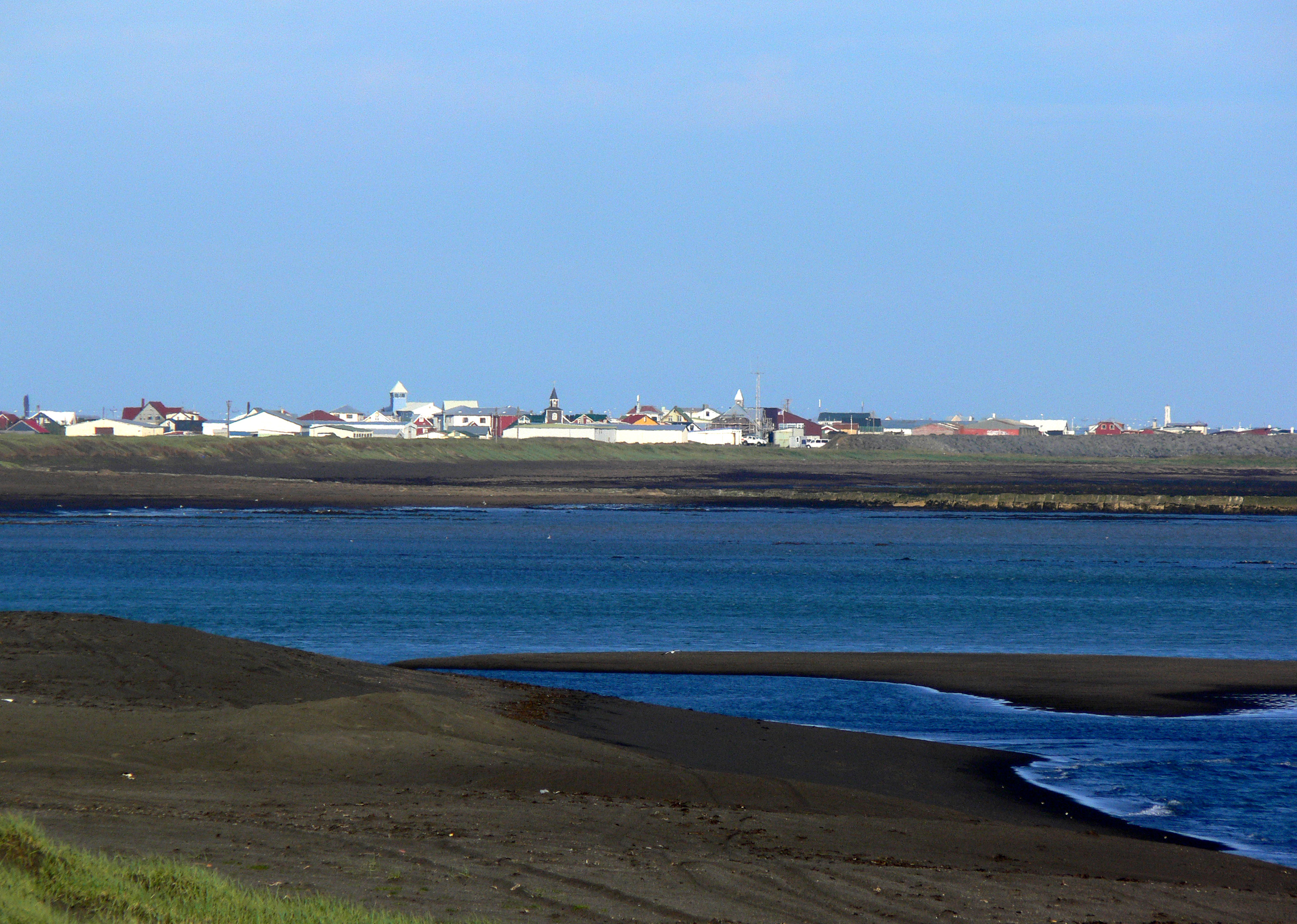 Über die Ölfusá nach Eyrarbakki.